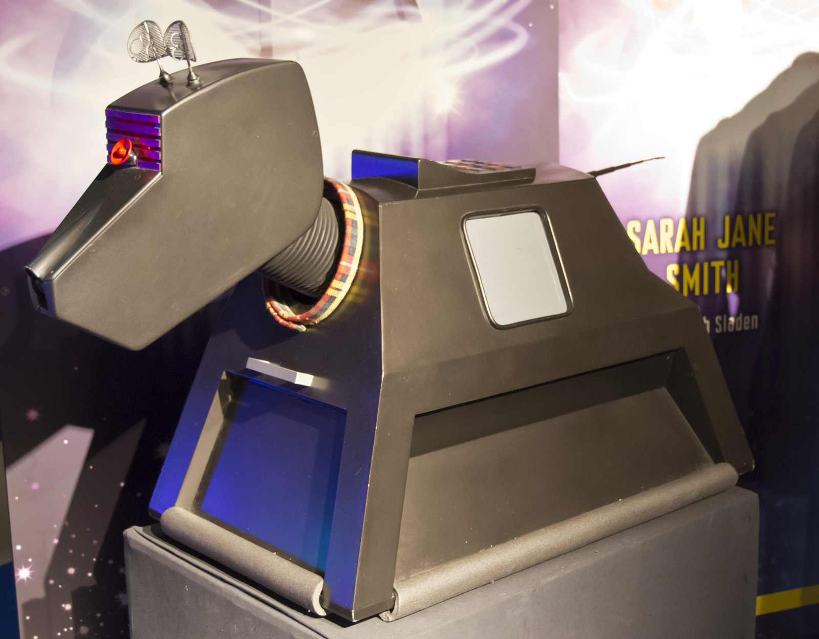 K9